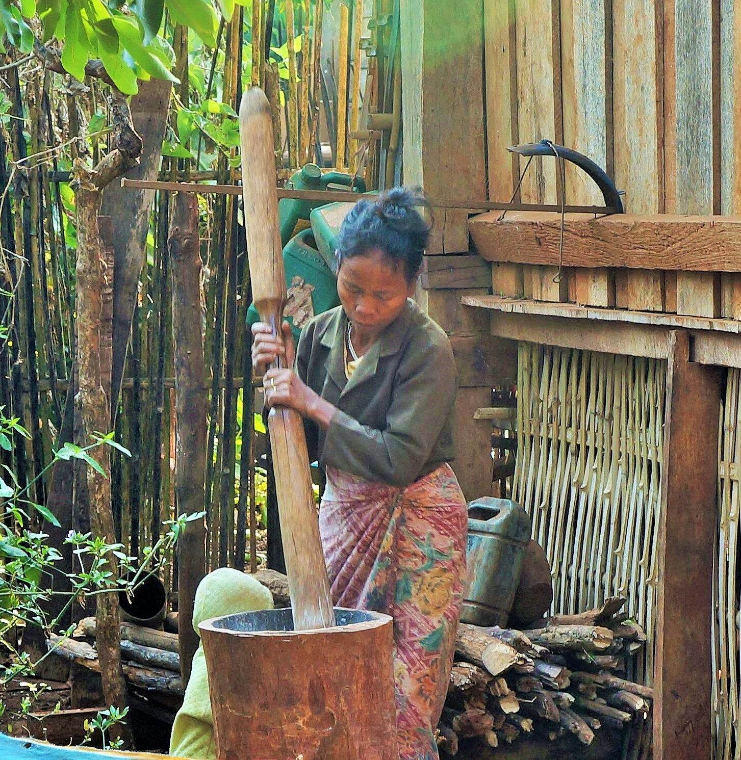 Pounding in Model healthy village, Salavan Province Laos.